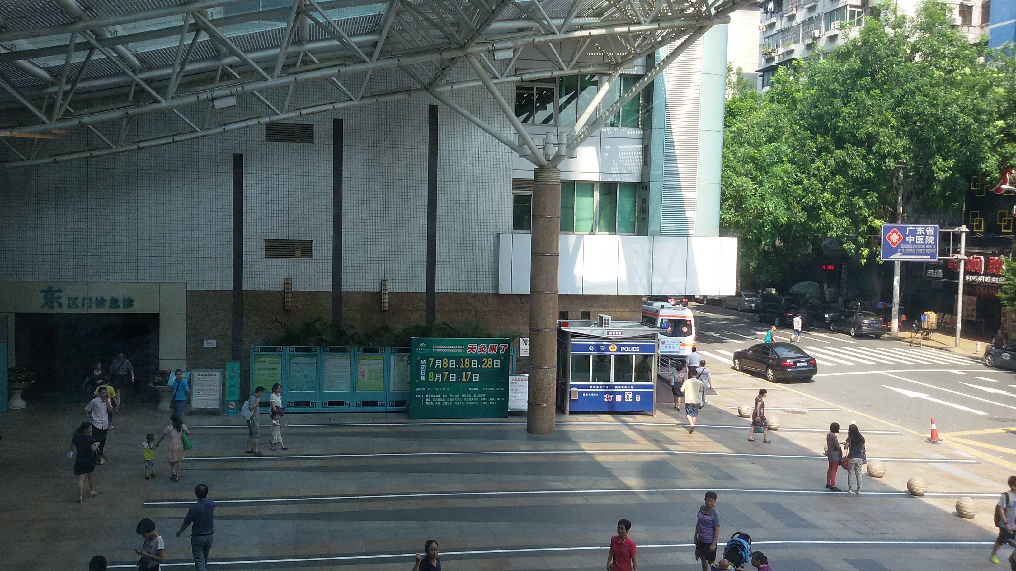 粵語: 廣東省中醫院總院正門附近